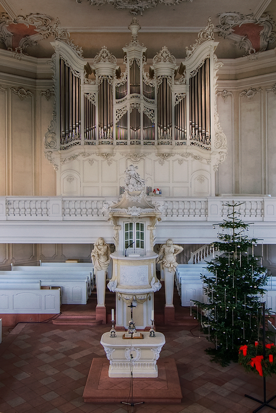 Saarbrücken, Ludwigskirche Altar, Organ